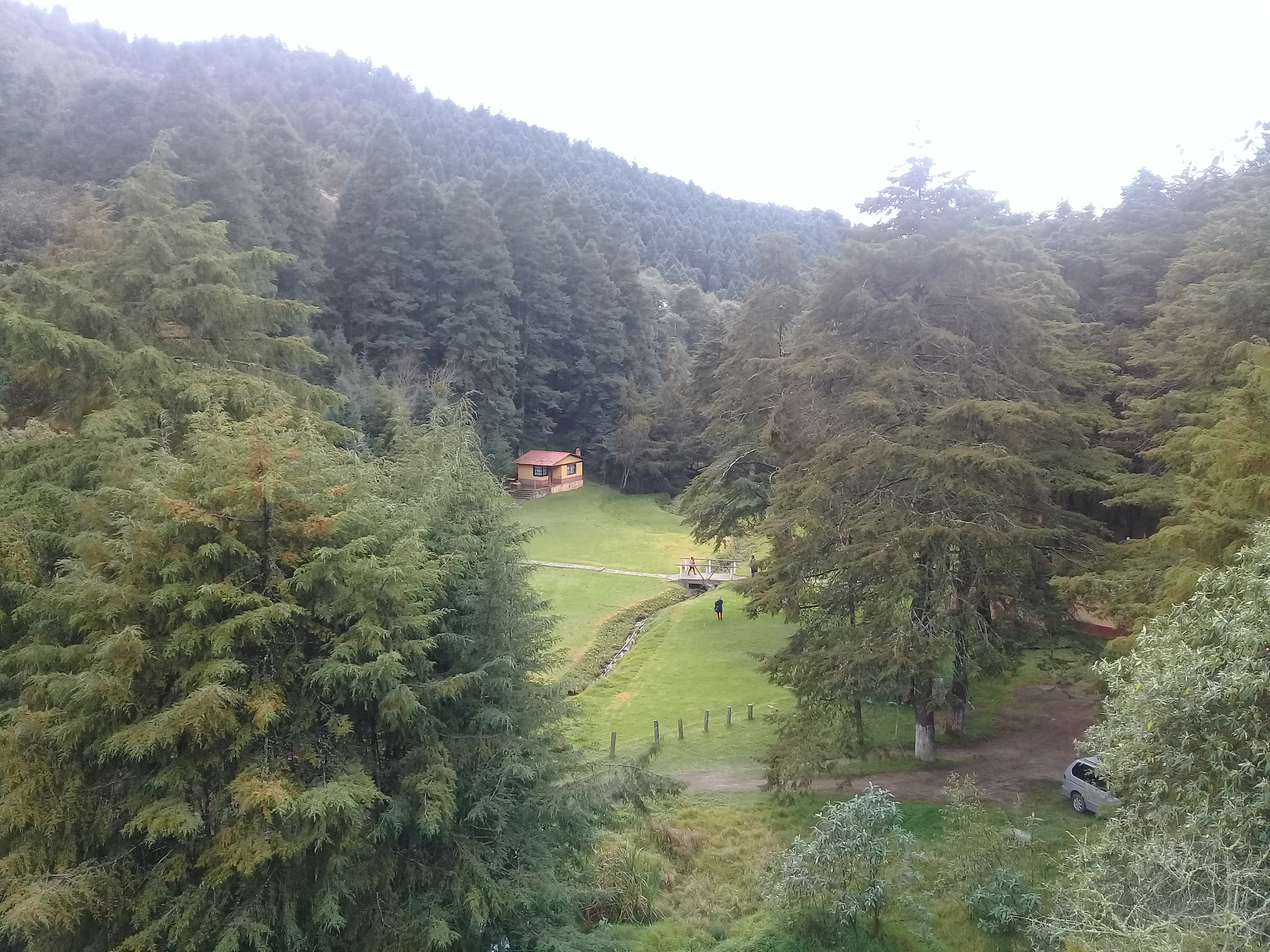 Vista dalla diga El Cedral in località La Estanzuela, nel comune di Mineral del Chico, nello Stato di Hidalgo in Messico.